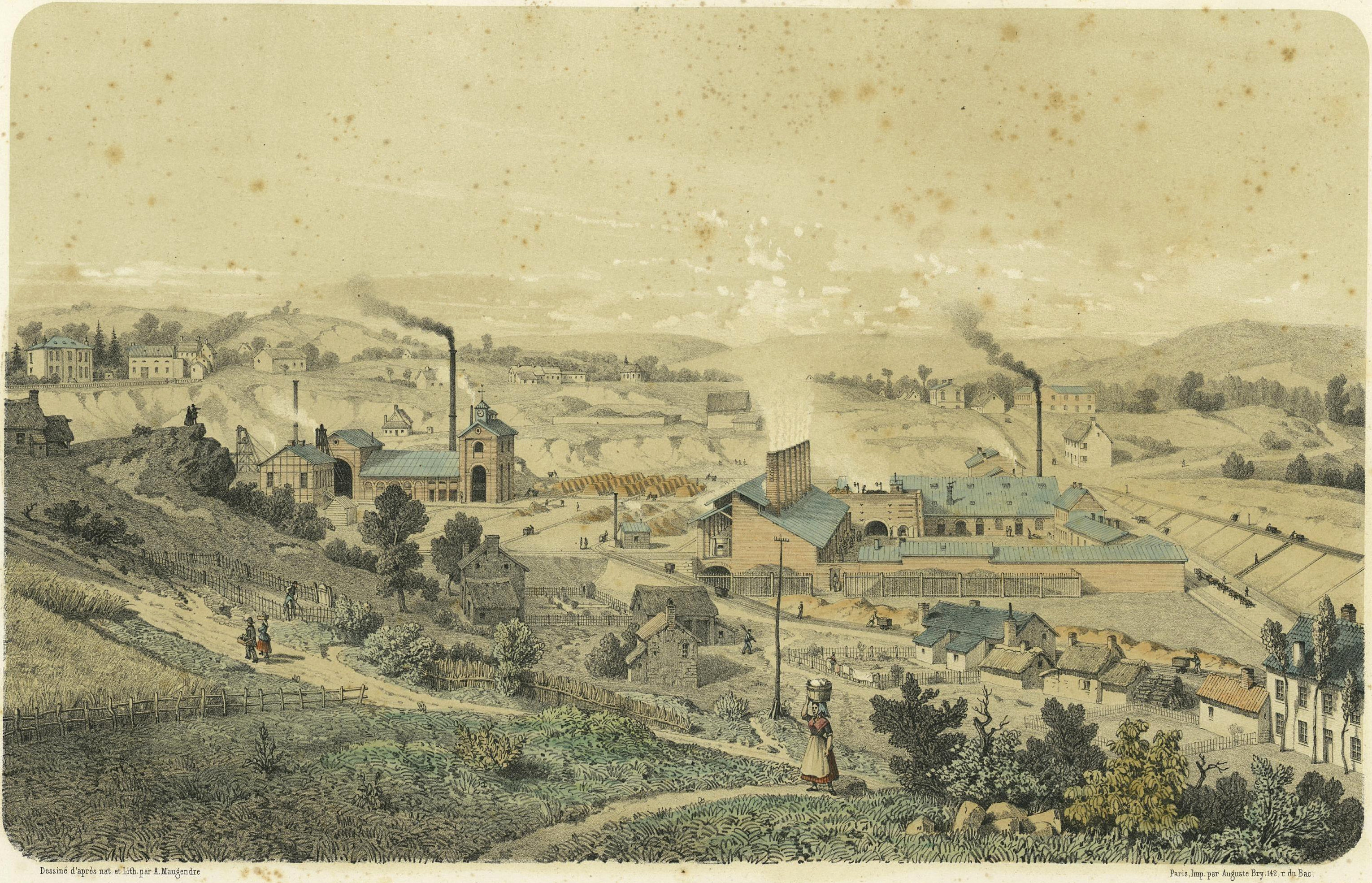 Lithograife der Zinkwerke der Vieille Montagne in Neutral-Moresnet